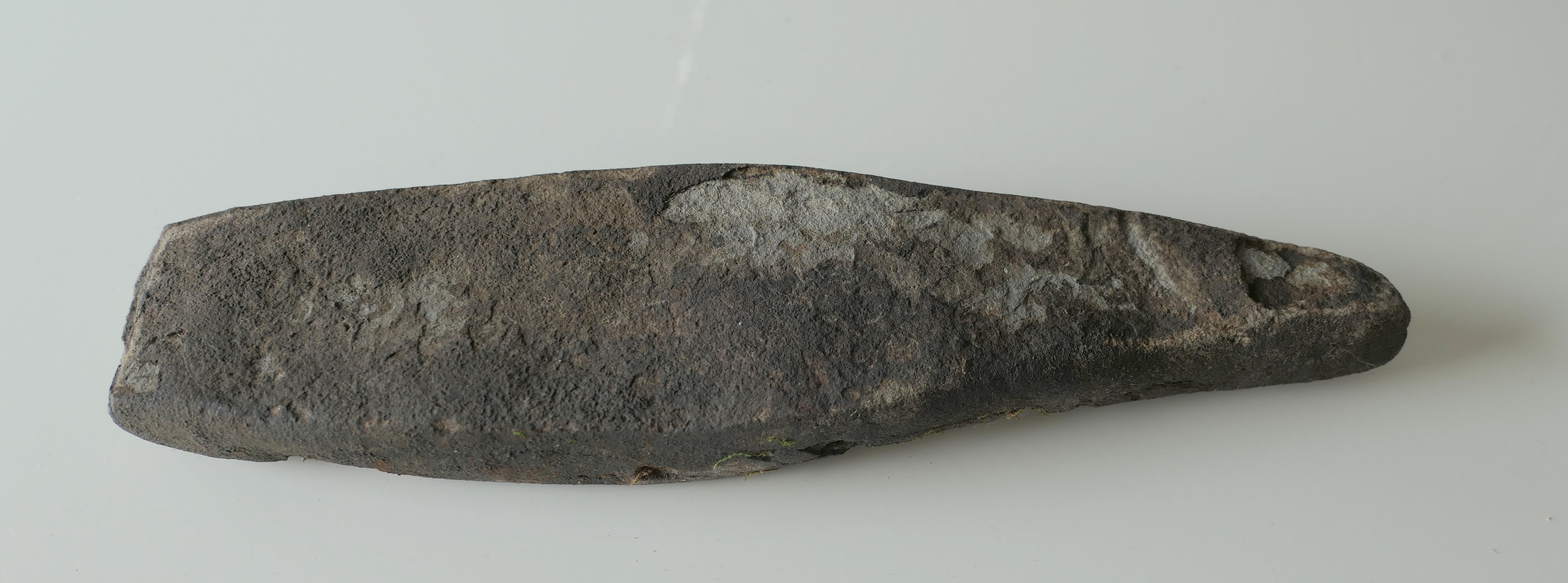 Wetzstein Lesefund Spitalwald Befestigung 20.7.2019 48°18'10,72" N 10°45'59,05"O